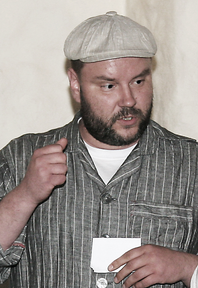 Gaute Kivistik, humorist 07